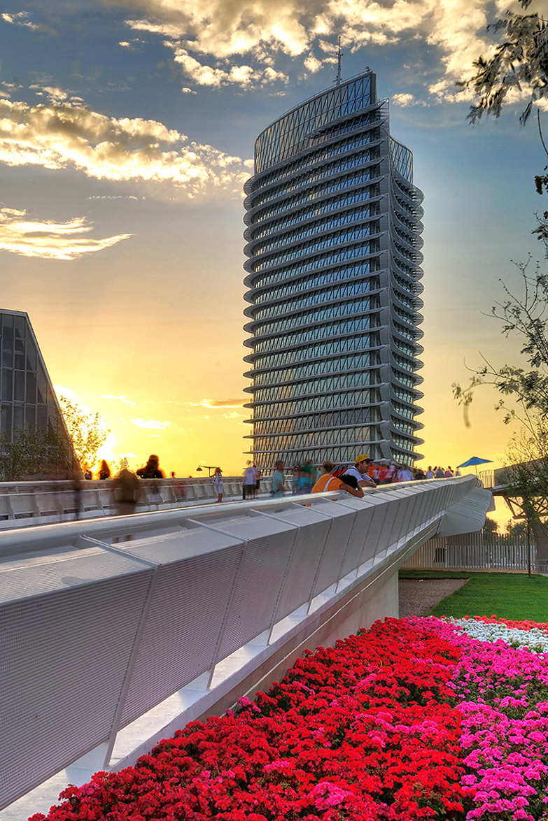 Water Tower @ Expo2008, Zaragoza. ( Spain, 2008 ) del Aqua#comments Architect Enrique de Teresa Con mas de 70m de altura y una esplendida construcción (ver vídeo) en cristal la TORRE del AGUA es el edificio más emblemático de la EXPO 2008 de ZARAGOZA. En su interior podemos admirar una escultura suspensa de 23 metros que representa un "splash" de agua.